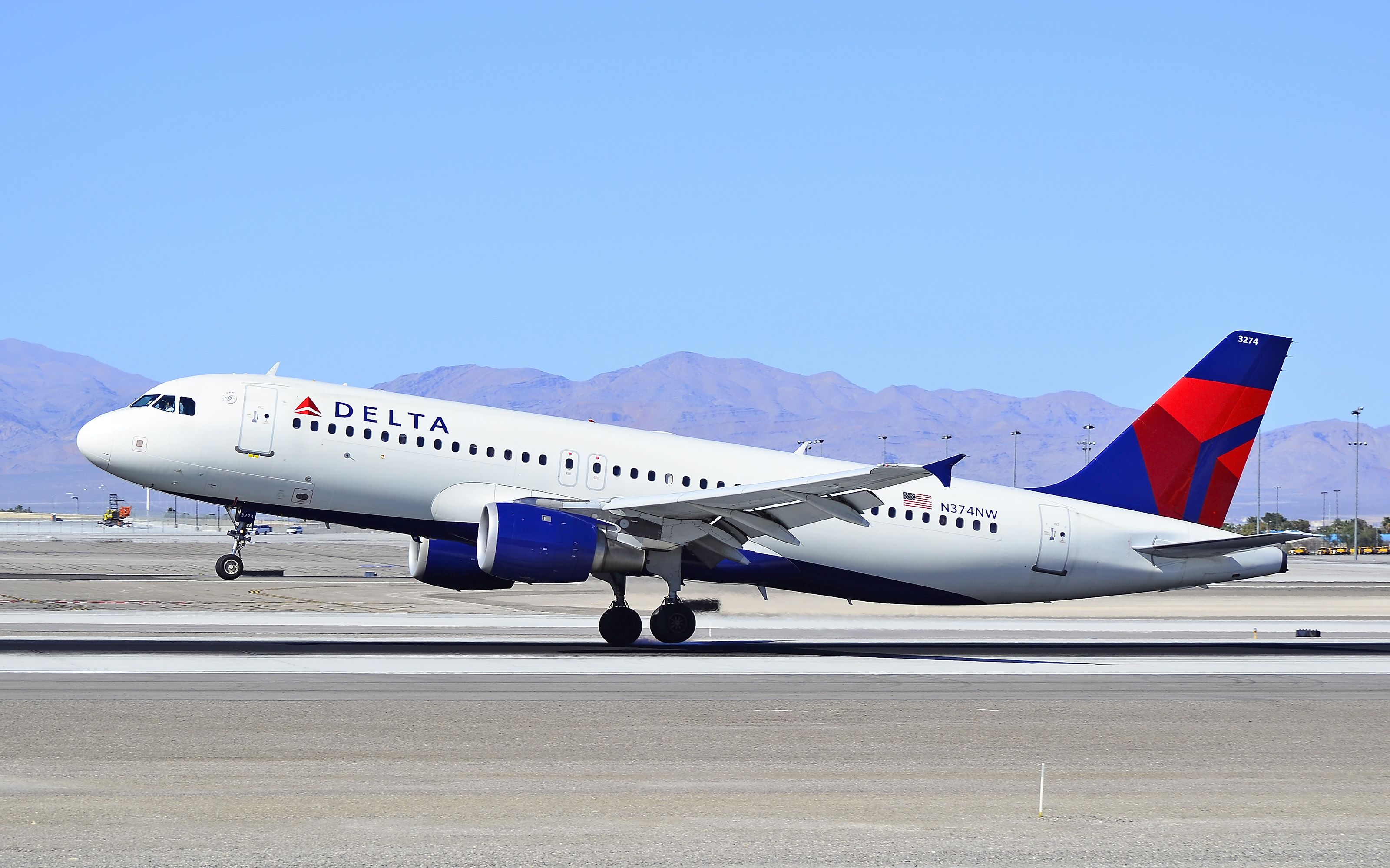 Las Vegas - McCarran International (LAS / KLAS) USA - Nevada, March 31, 2011 Photo: Tomás Del Coro